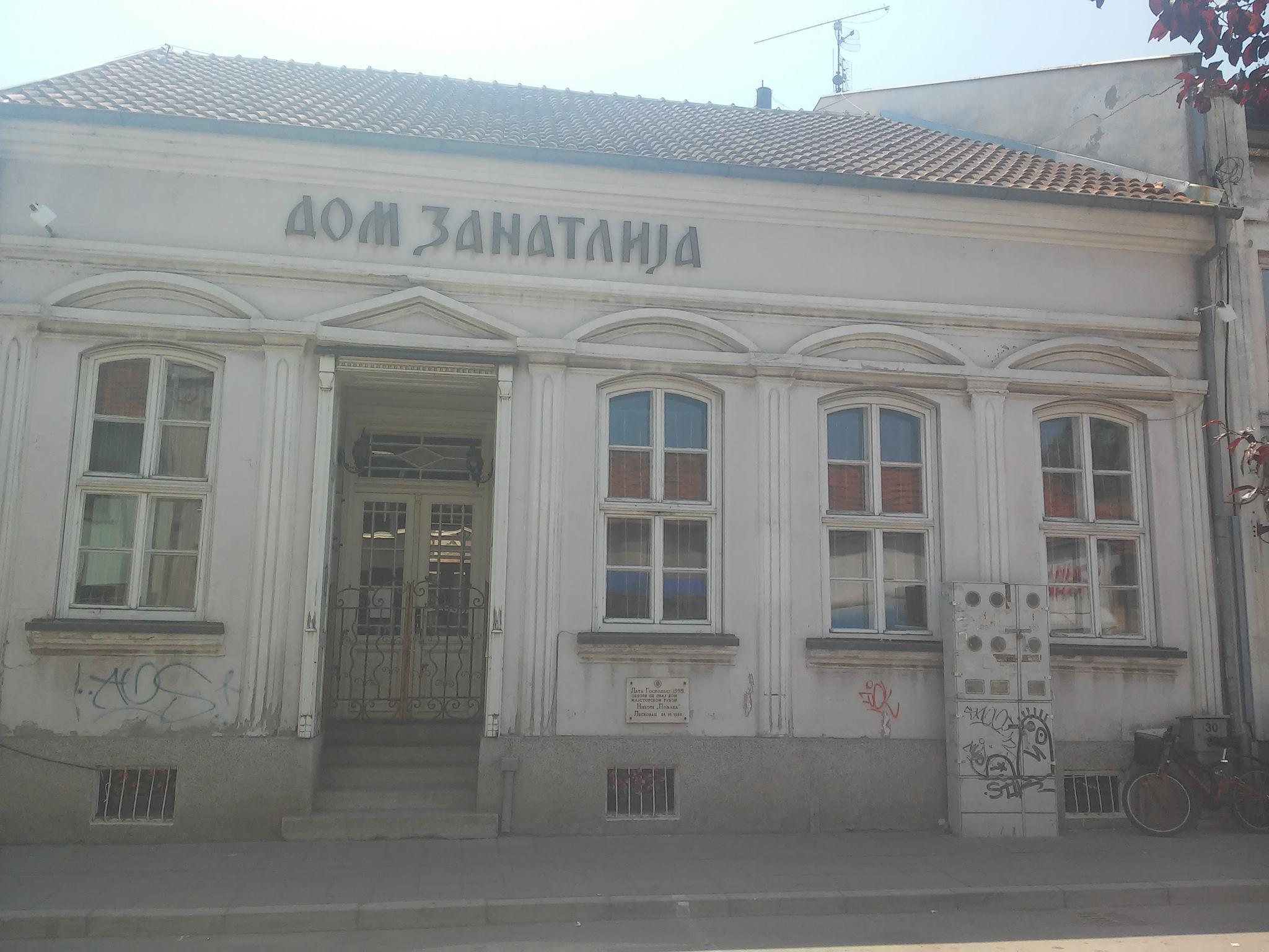 Српски (ћирилица): Зграда Дома занатлија, сада Удружење предузетника града Лесковца